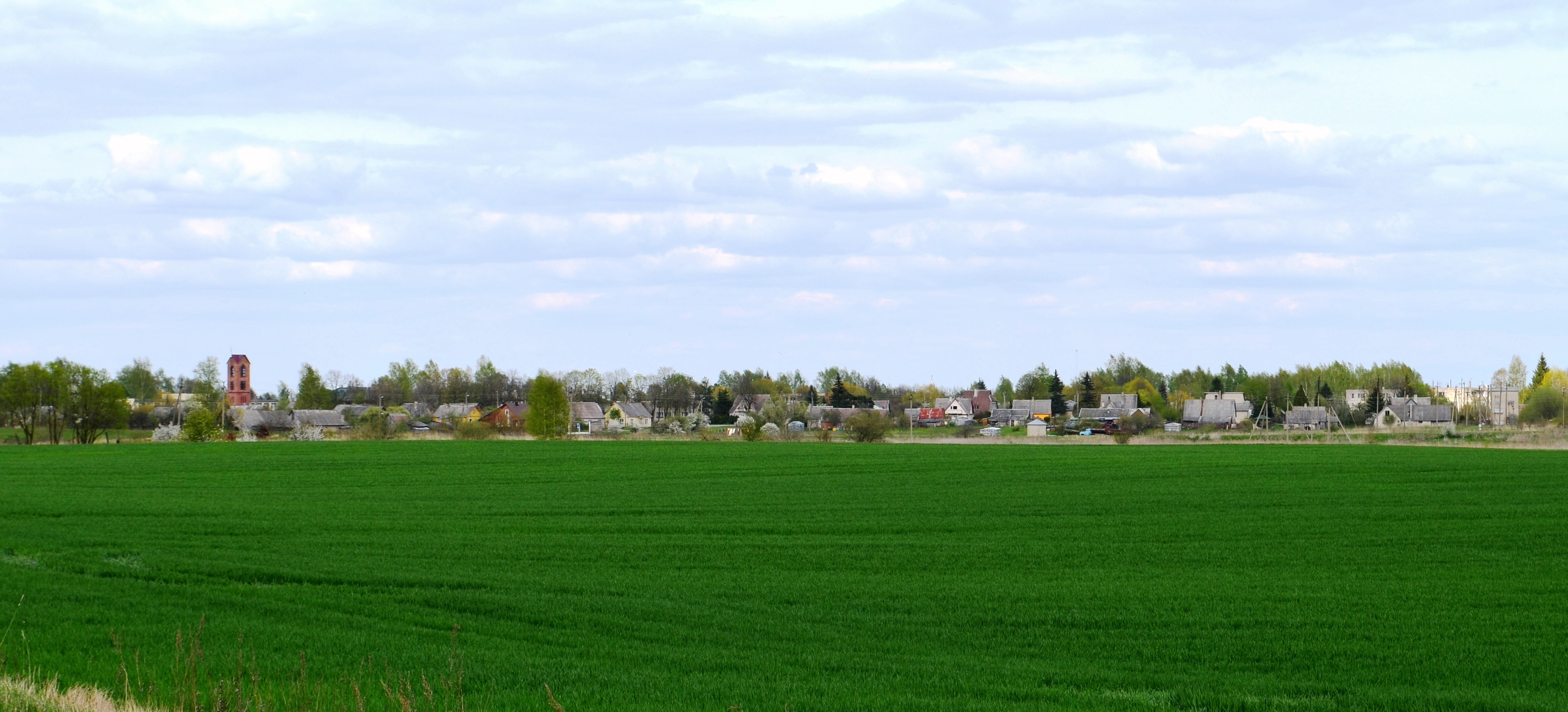 Pagiriai, Kėdainių r.